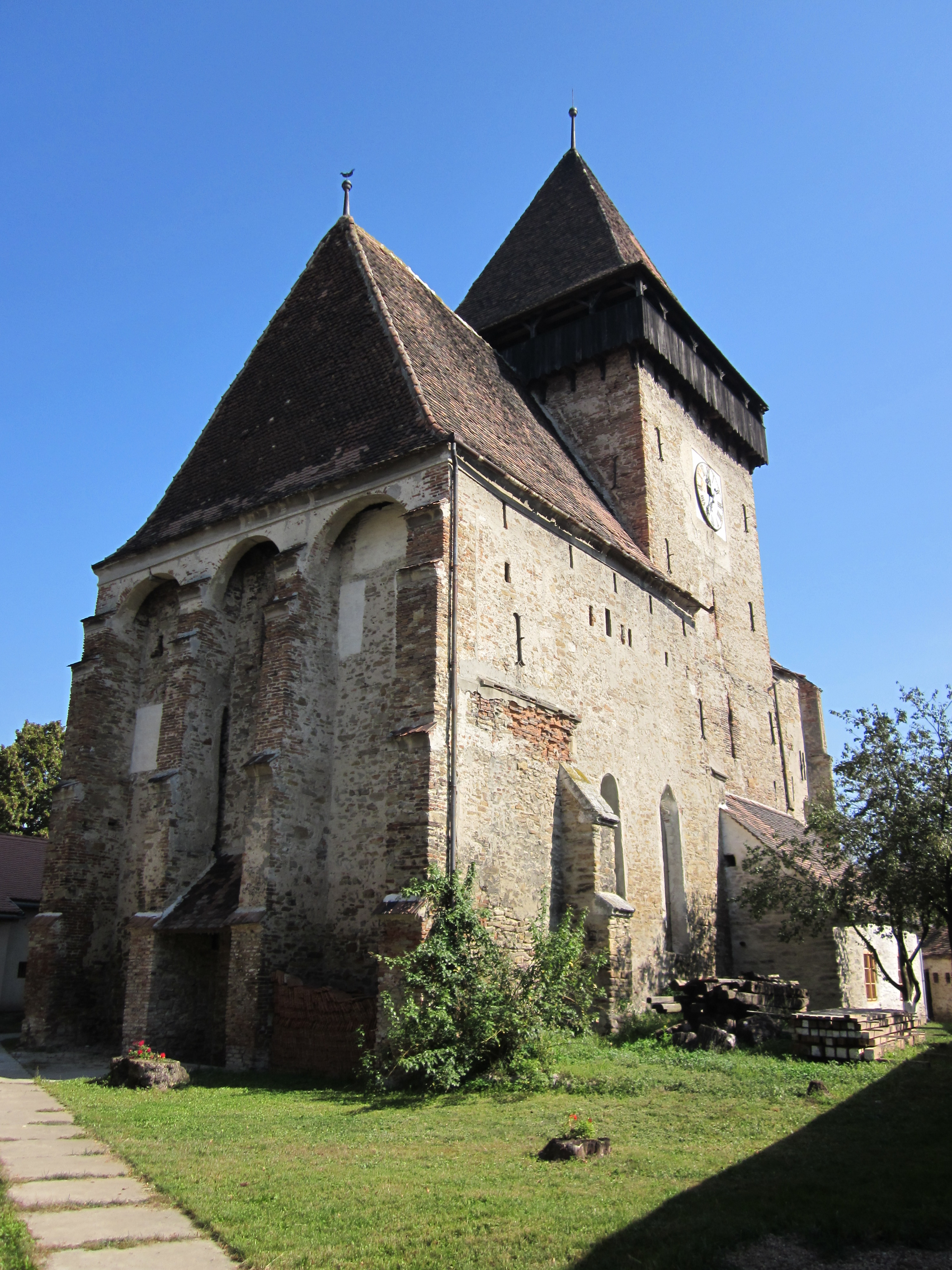 Biserica Fortificata din Axente Sever Sibiu Poza 2